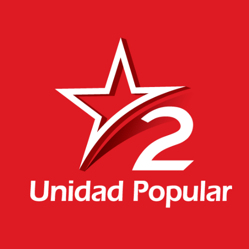 logo de up